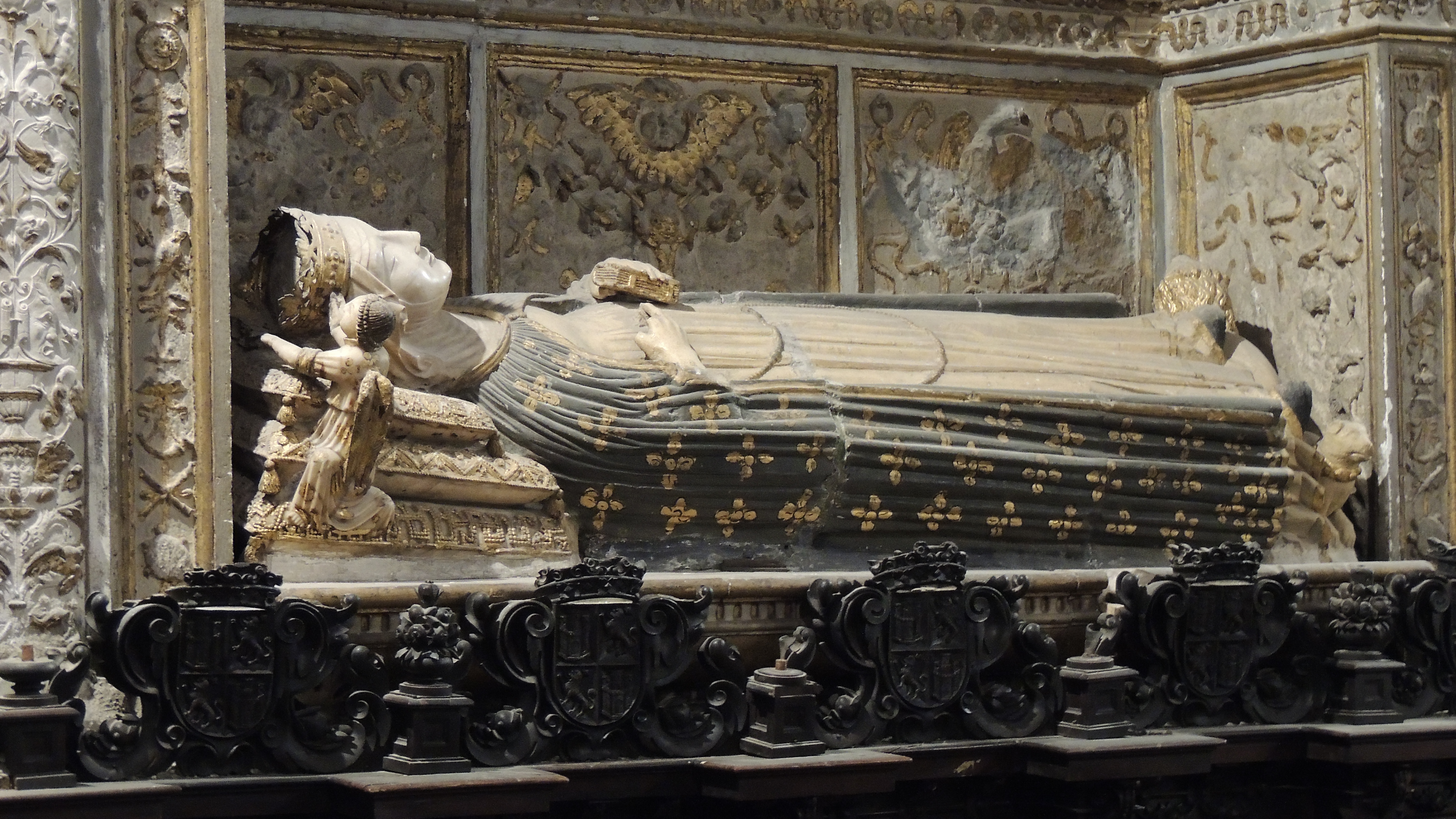 Sepulcro de la reina Catalina de Lancáster (1373-1418), que fue reina consorte de Castilla por su matrimonio con el rey Enrique III y era hija de Juan de Gante, duque de Lancaster, y de Constanza de Castilla. El sepulcro se encuentra en la capilla de los Reyes Nuevos de la catedral de Toledo, (España).